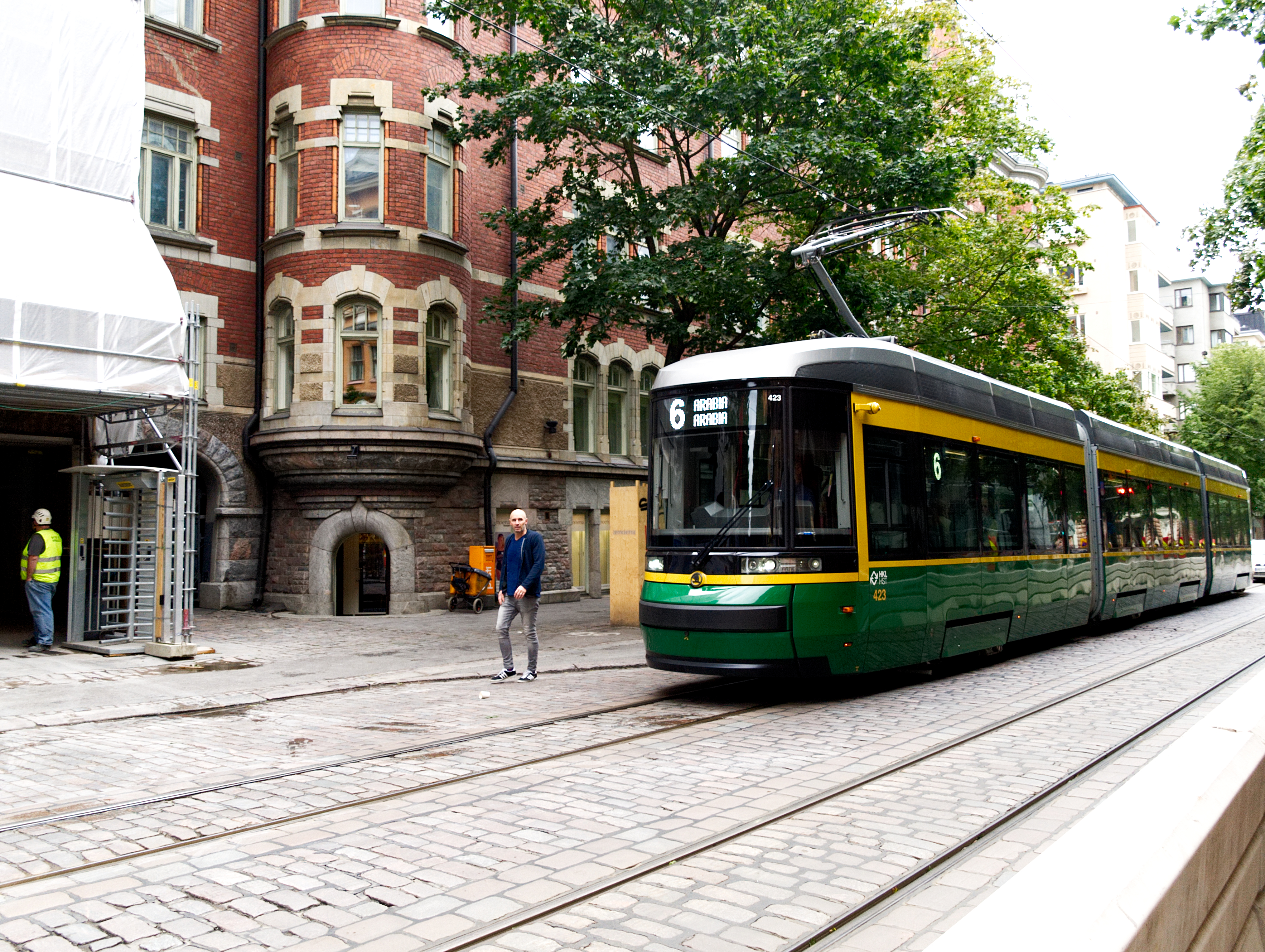 Artic-raitiovaunu linjalla 6